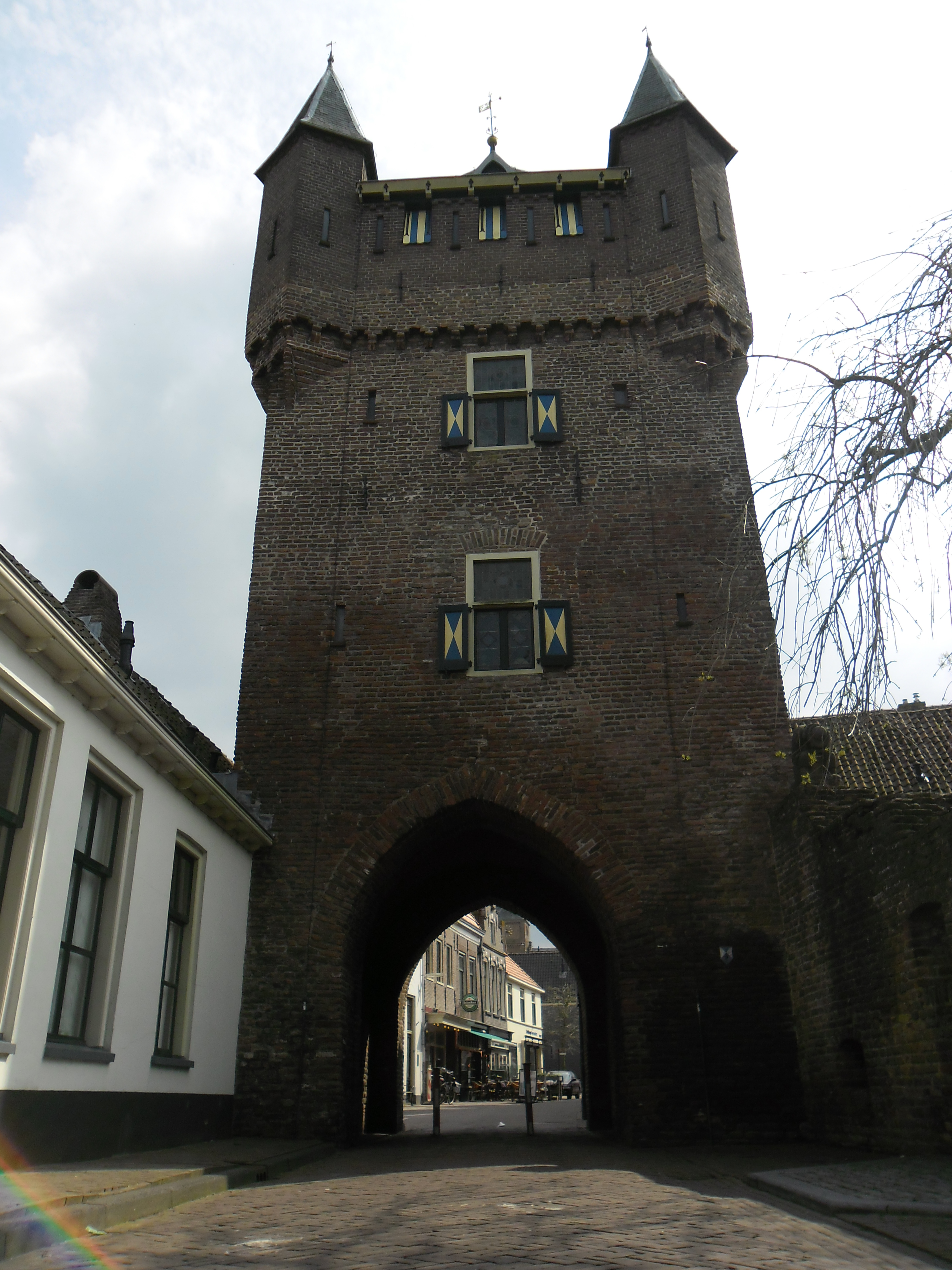 De Dijkpoort in Hattem vanaf de achterzijde (richting openbare weg)